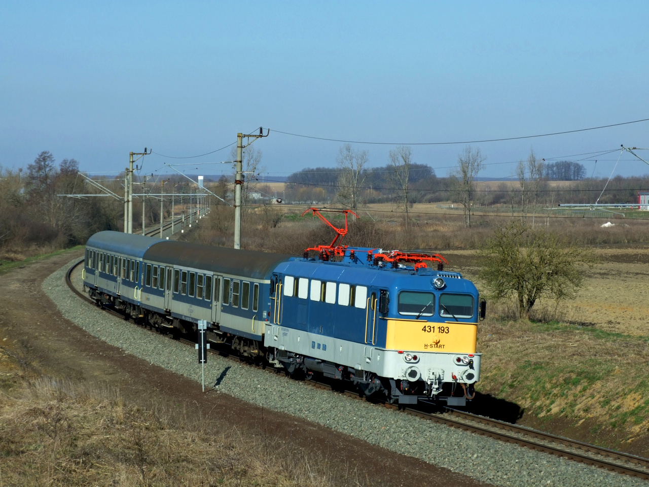 Egy átlagos személyvonat Taszár közelében